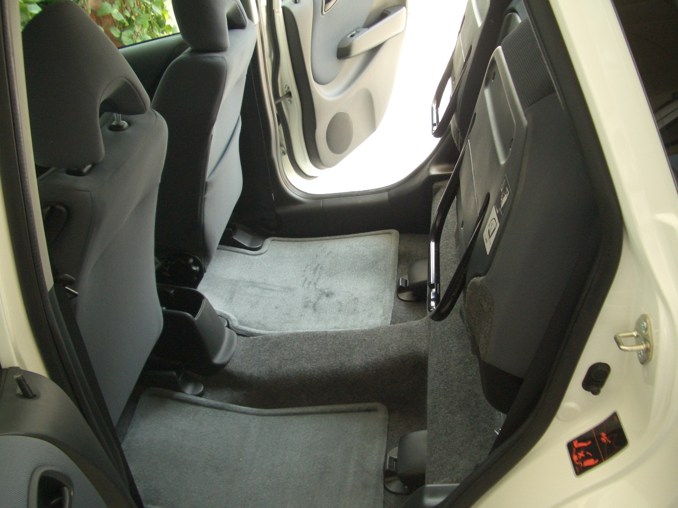 Andamos viendo entre un Clio y un Fit. Alguna recomendacion?